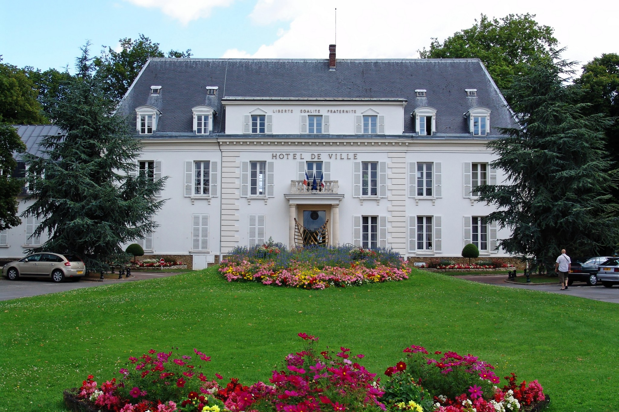 Mairie de Pontault Combault (77)